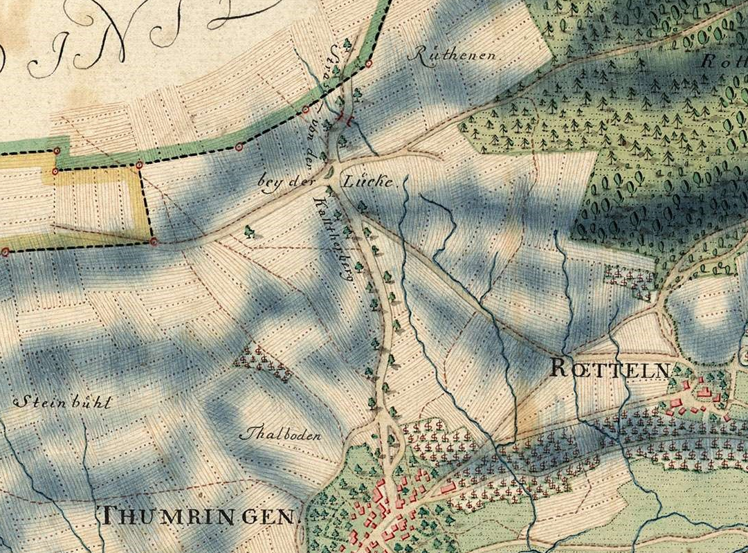 Kartenausschnitt aus File:Karte von Tumringen, Rötteln und Umgebung.jpg